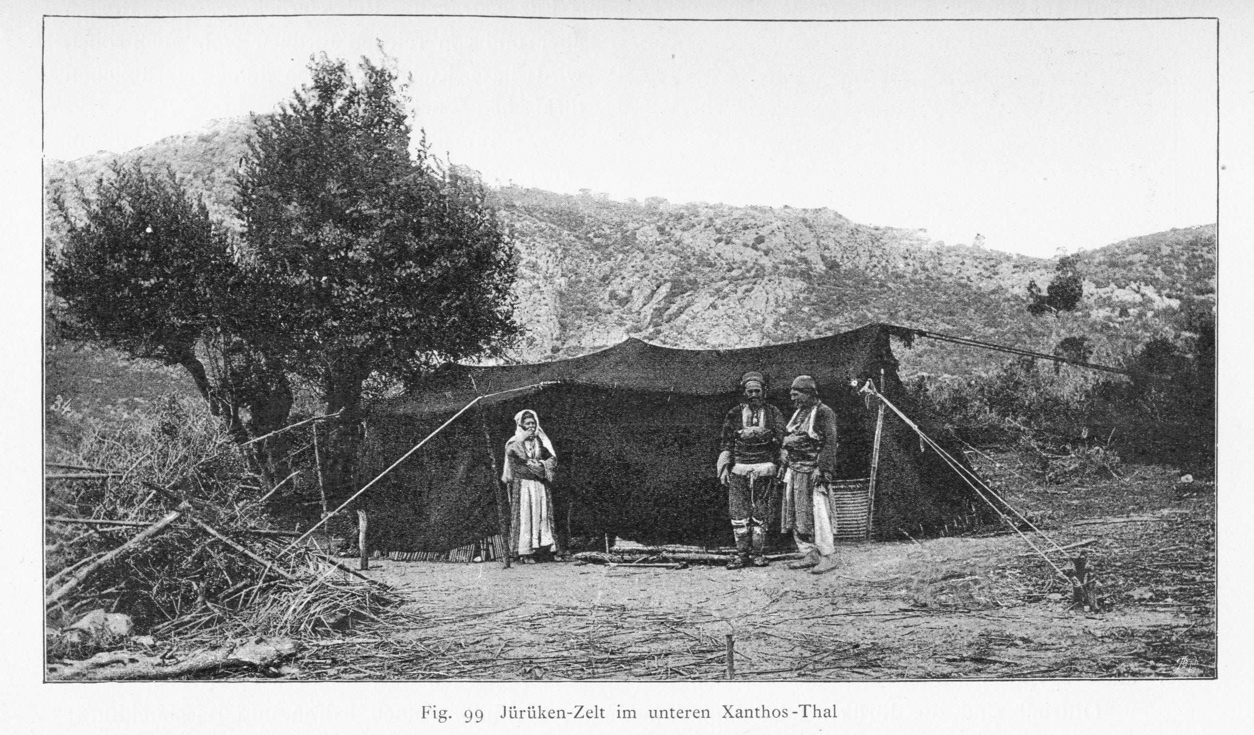 Yörük-Mann (mittig) und -Frau (links) vor dem Schwarzen Zelt am unteren Koca Çayı